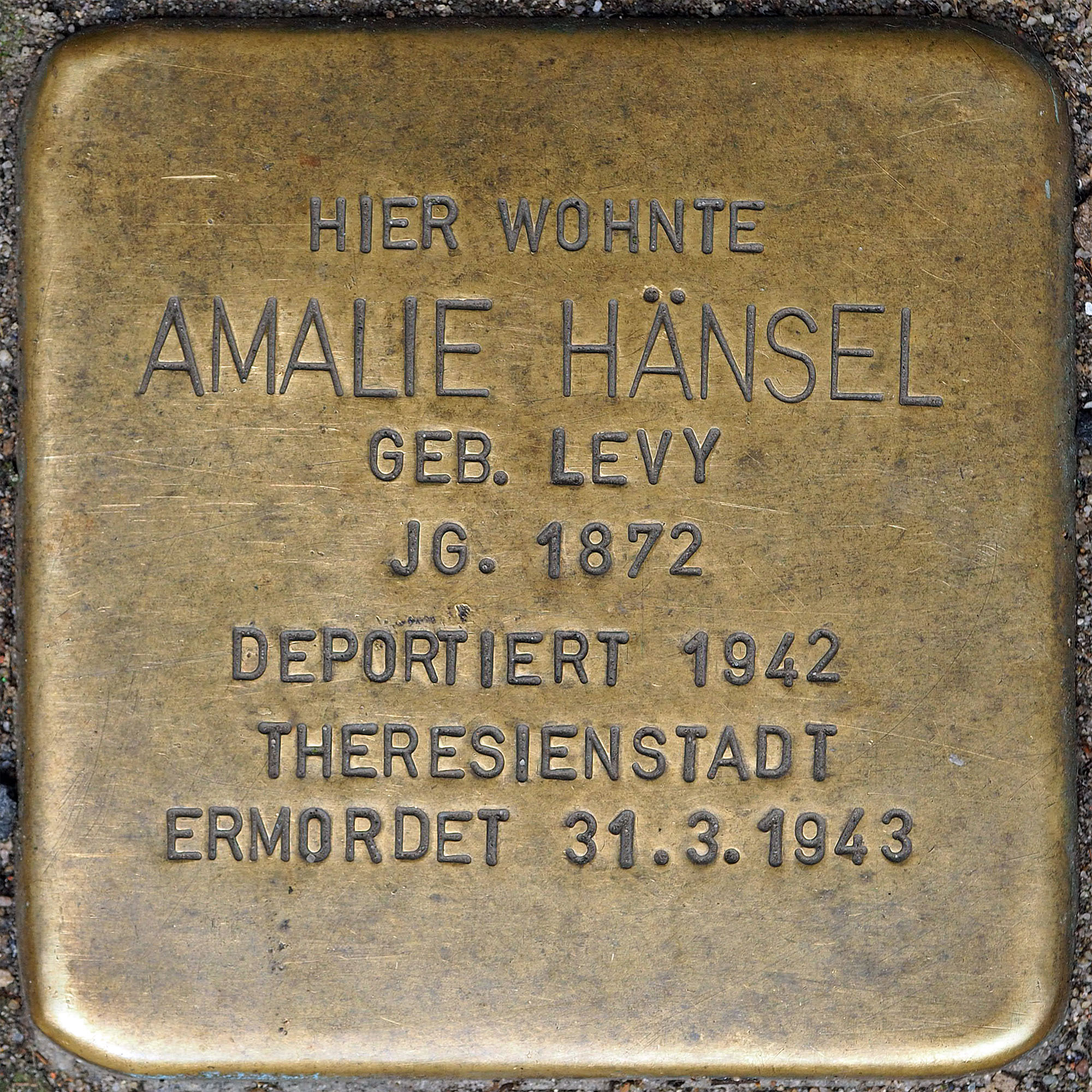 Stolpersteine MG: Hänsel, Amalie